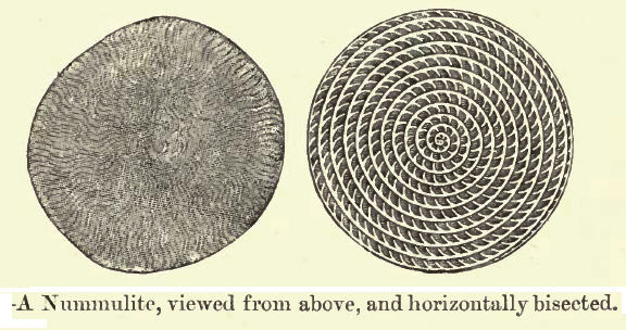 Nummulite